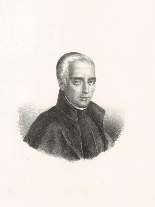 Dal Dizionario biografico degli uomini illustri di Sardegna di Pasquale Tola, 1837